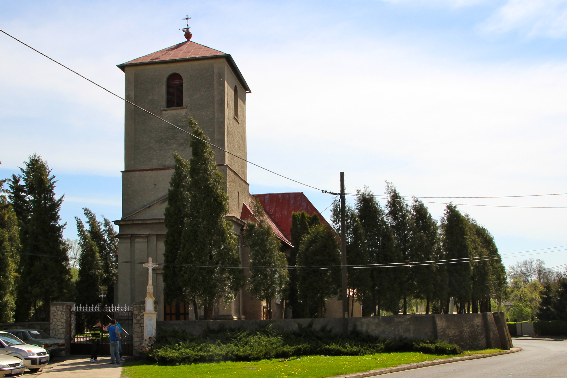 Włodzienin – rzymskokatolicki kościół parafialny pw. Świętej Trójcy.